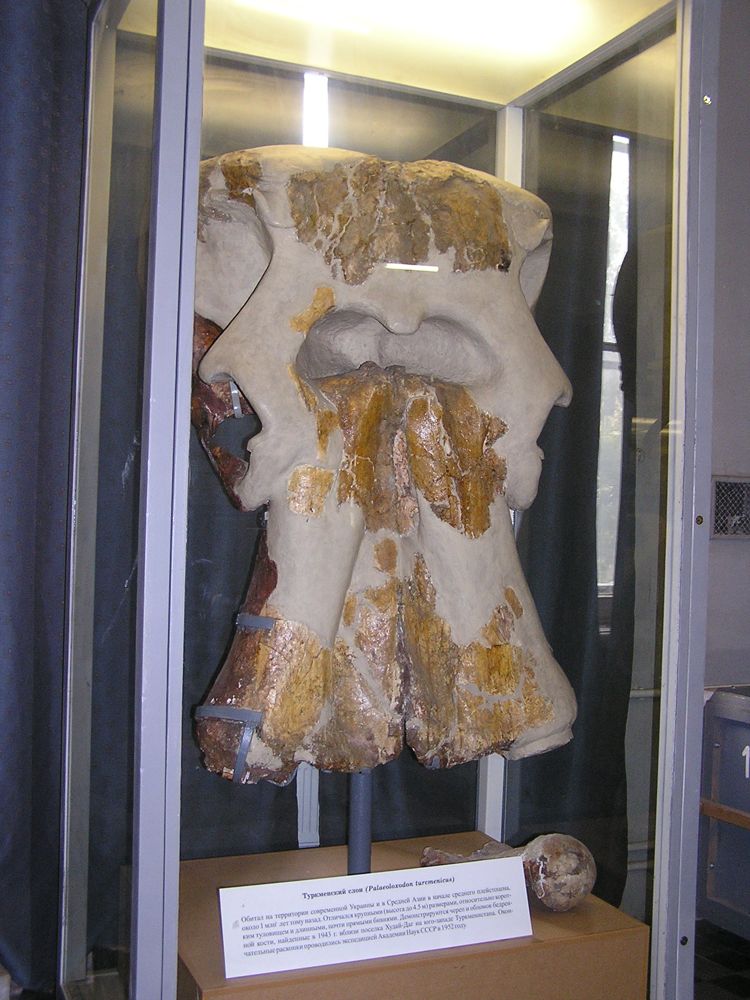 Palaeoloxodon sp